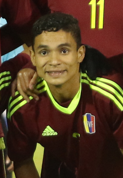 Quito, 2 feb (Andes).- La selección juvenil de Venezuela goleó 4-2 este jueves a su par de Ecuador, que comprometió seriamente sus opciones de clasificar al Campeonato Mundial Sub 20 Corea del Sur 2017, que se desarrollará en mayo próximo. ANDES/Micaela Ayala V.